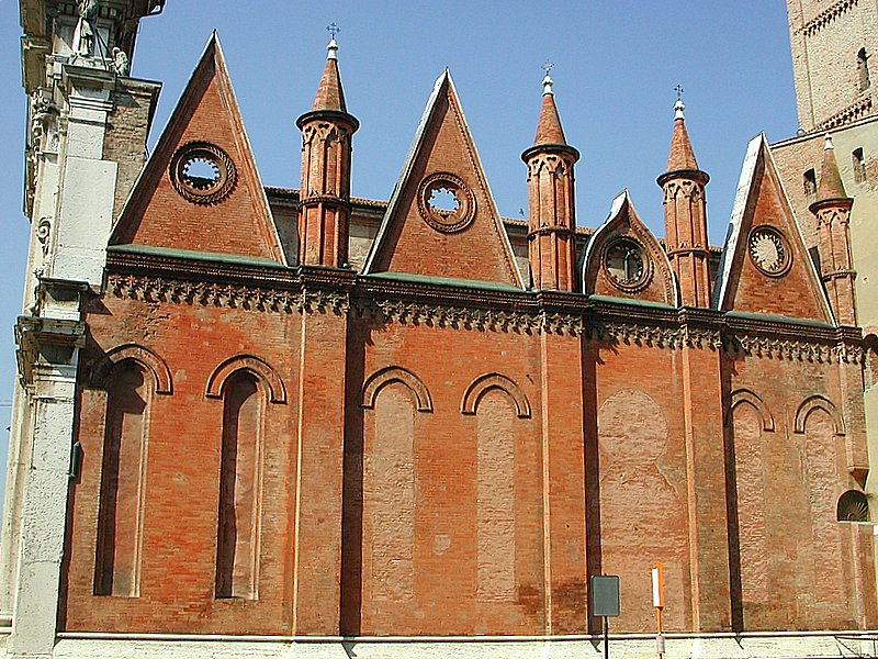 Un parte del Duomo di Mantova Source: photo uploaded by User:RicciSpeziari. Photographer: Riccardo Speziari